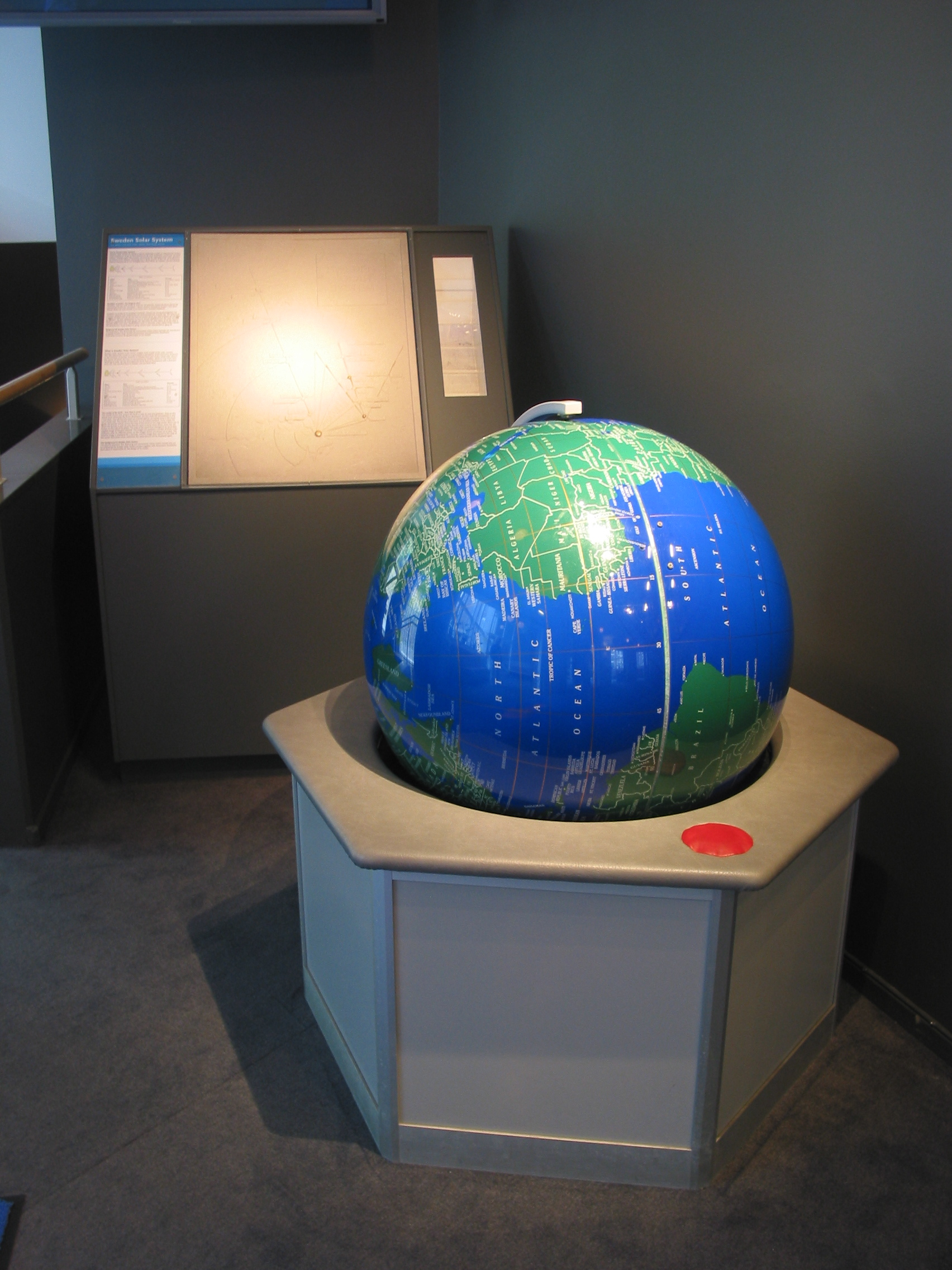 Jorden - Cosmonova, Stockholm - diameter 65 cm, 7,6 km från Globen